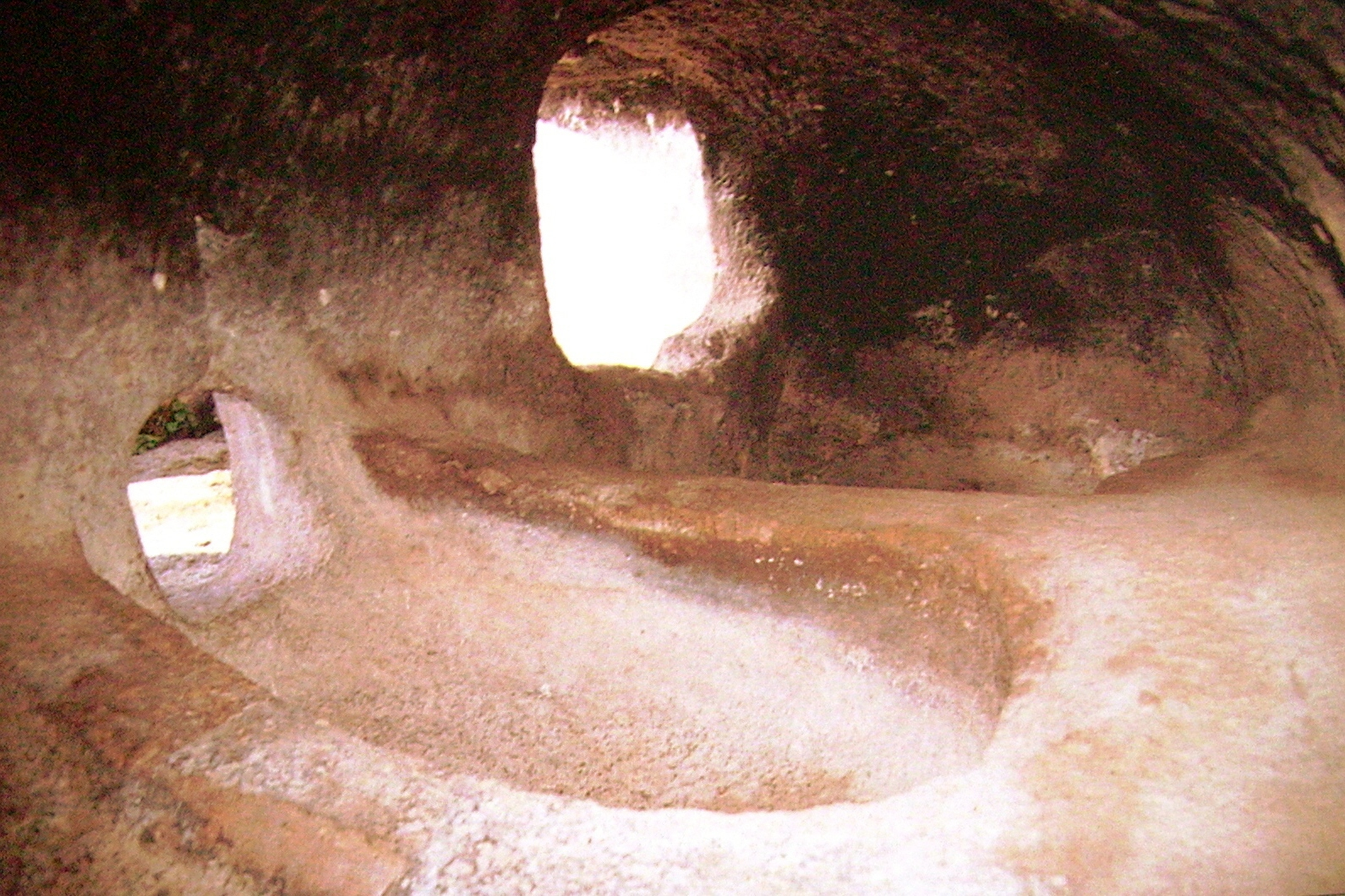 Sardinia (Italy) - interno di una Domus de Janas By Shardan --Shardan 16:34, 14 September 2007 (UTC)